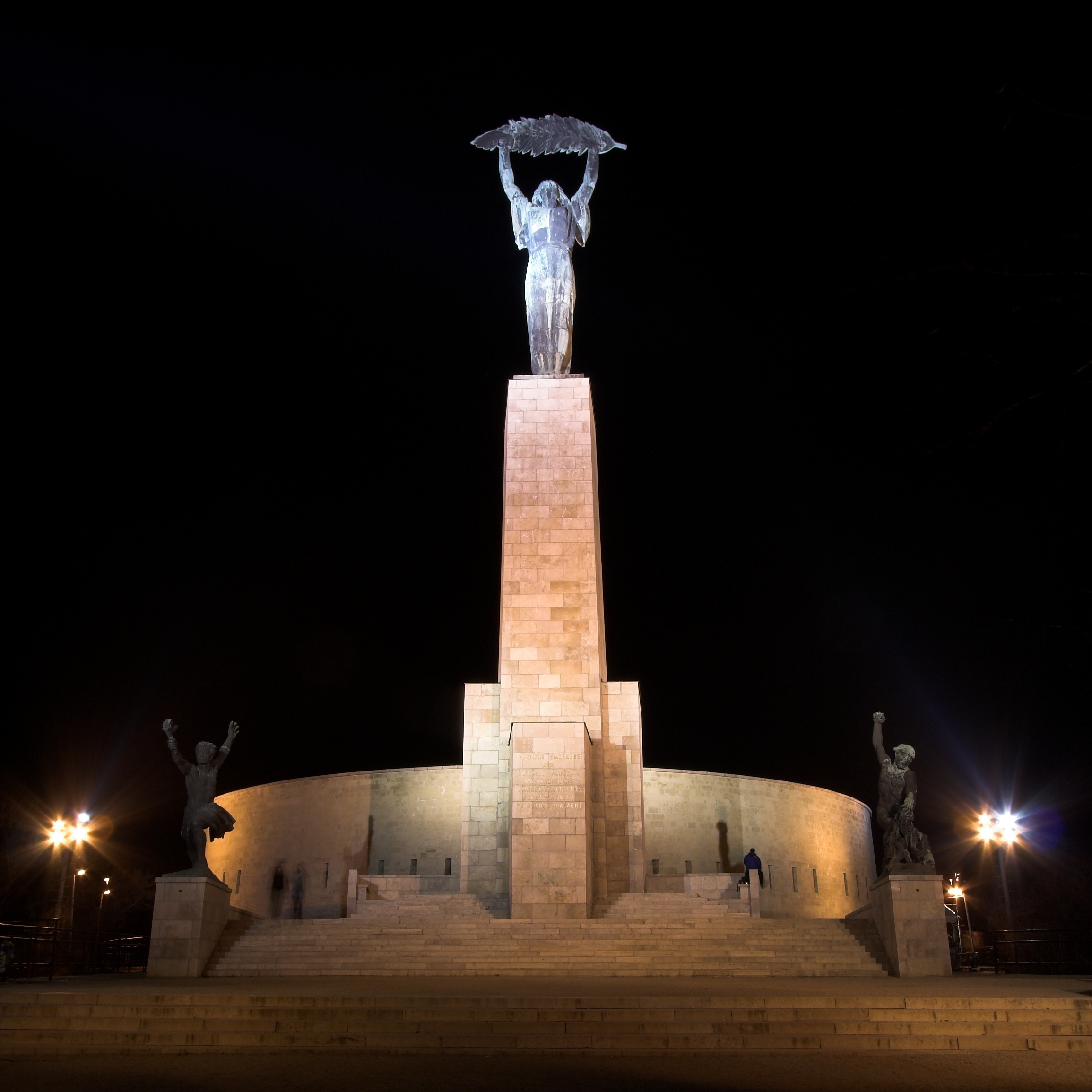 A Szabadság-szobor Budapesten.